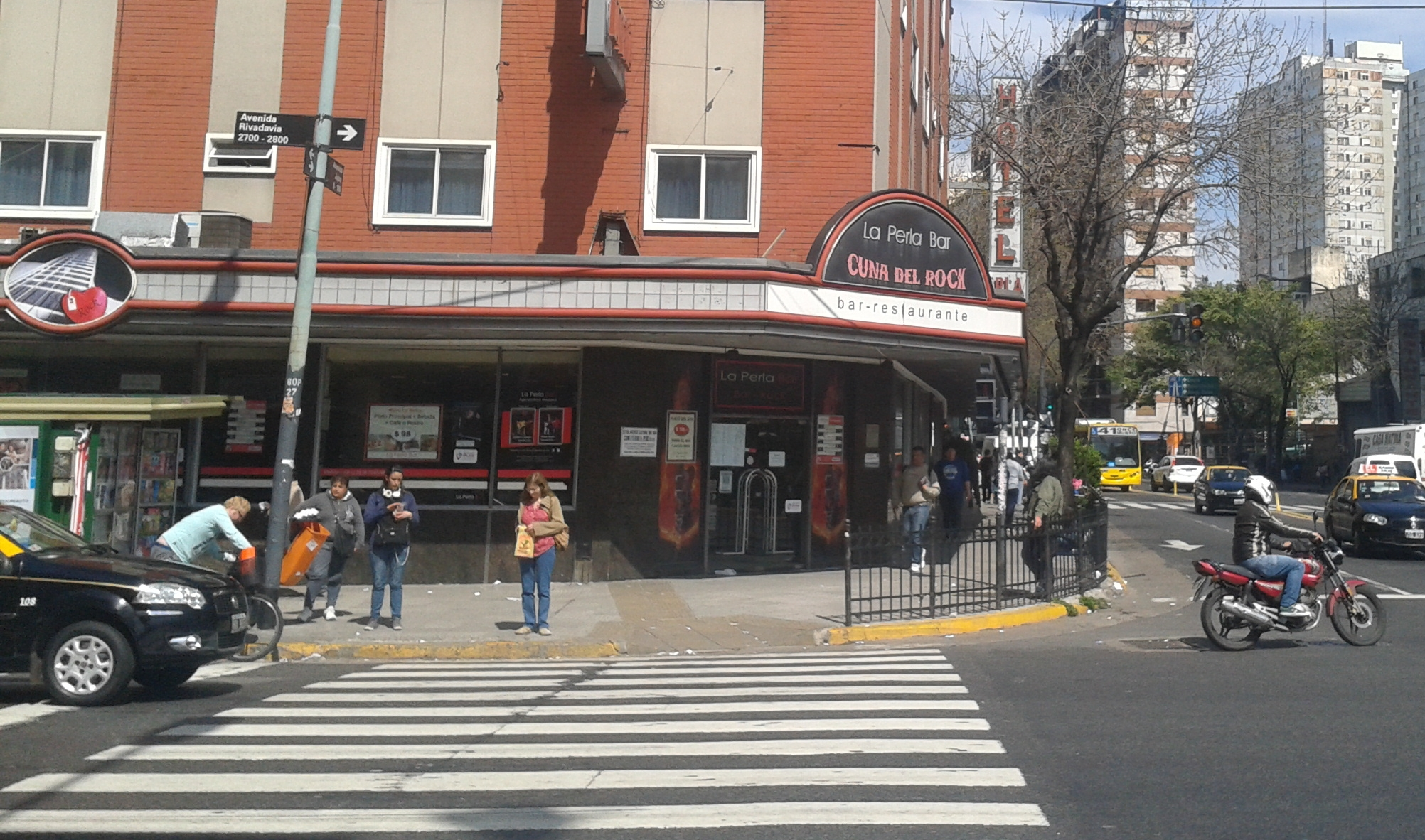 Histórico bar de Buenos Aires considerado la cuna del rock argentino.